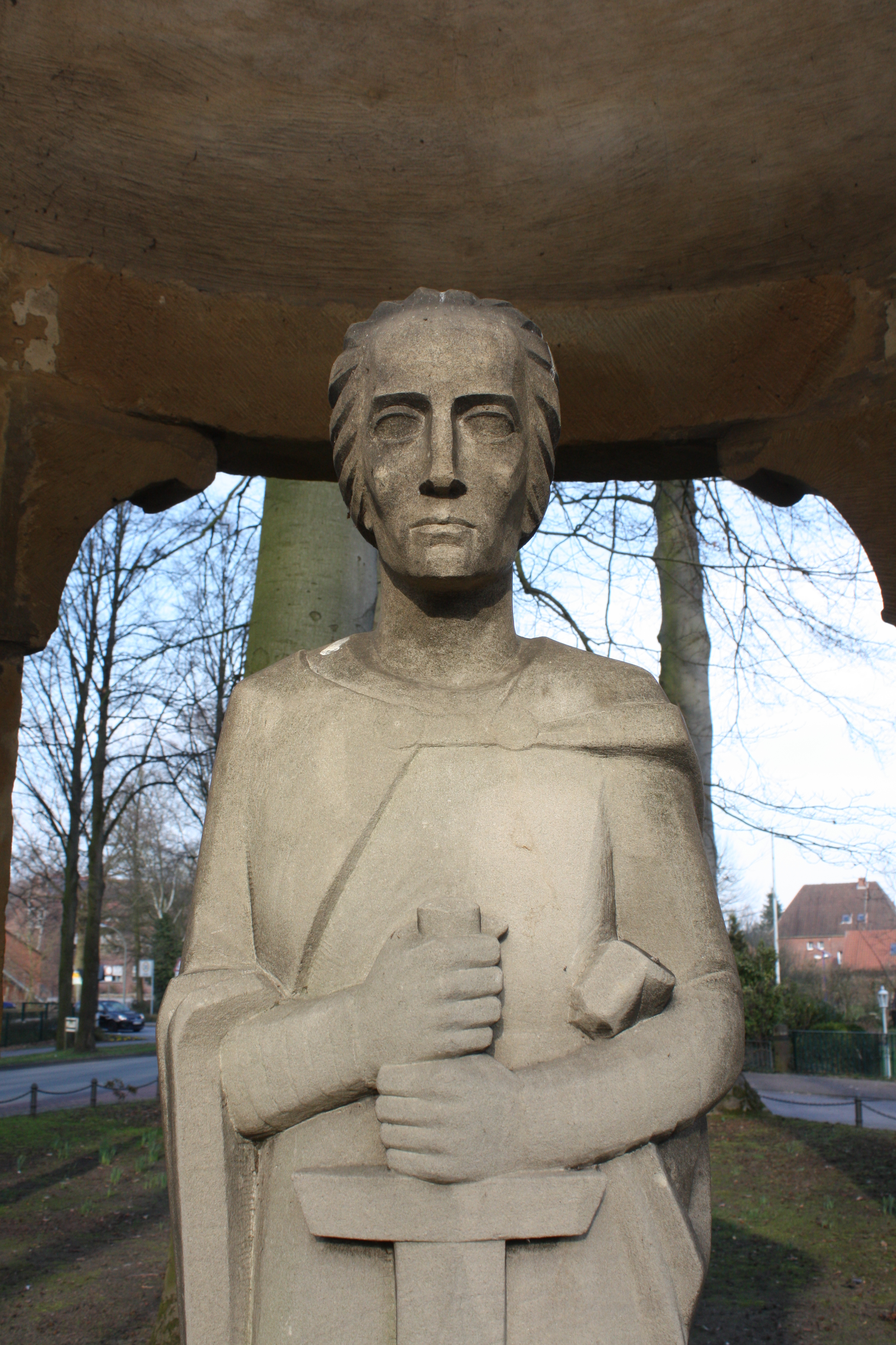 Oberkörper der St. Georgsfigur von Hubert Hartmann im Ehrenmal Marienfeld